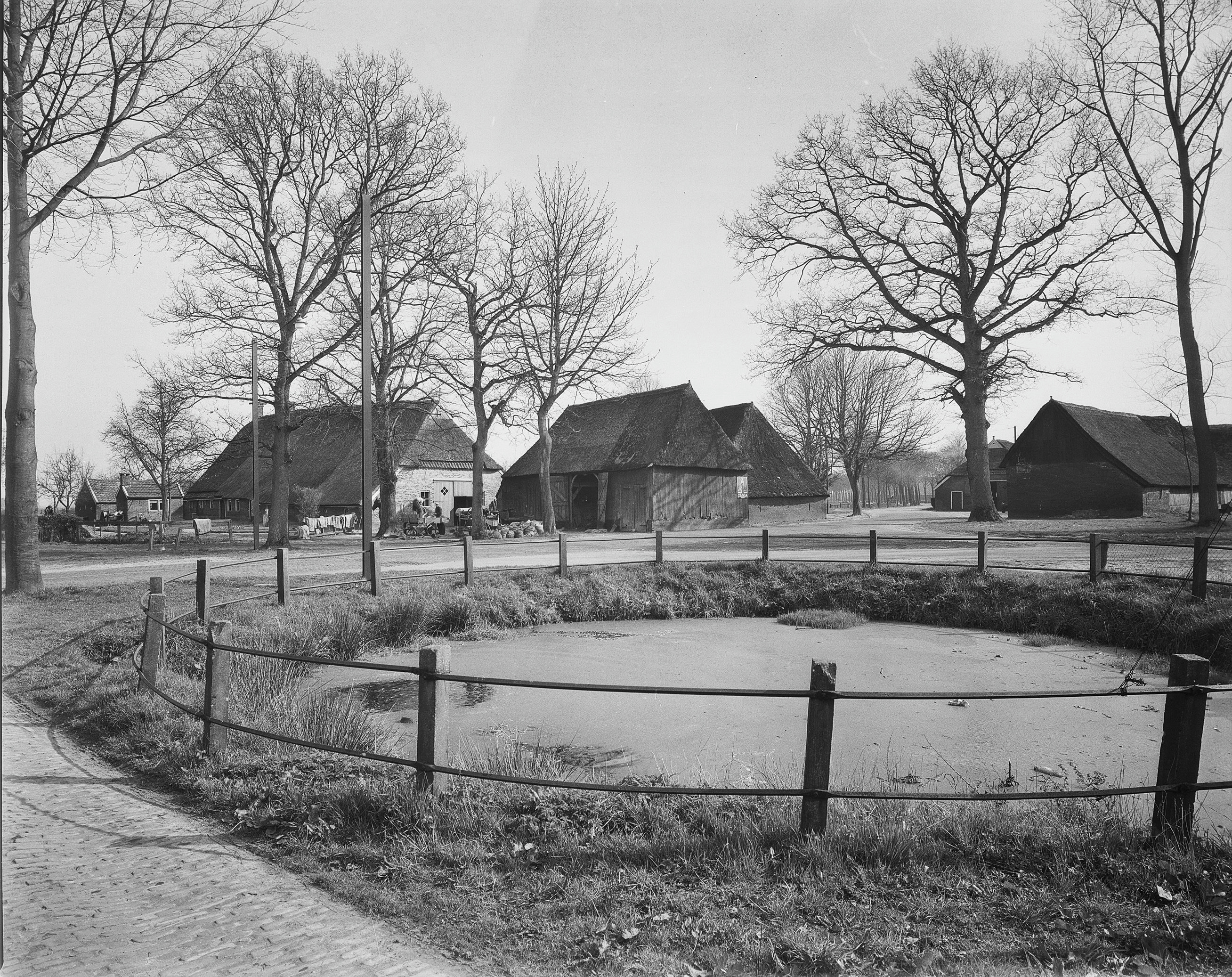 Diversen: Dobbe met boerderijen